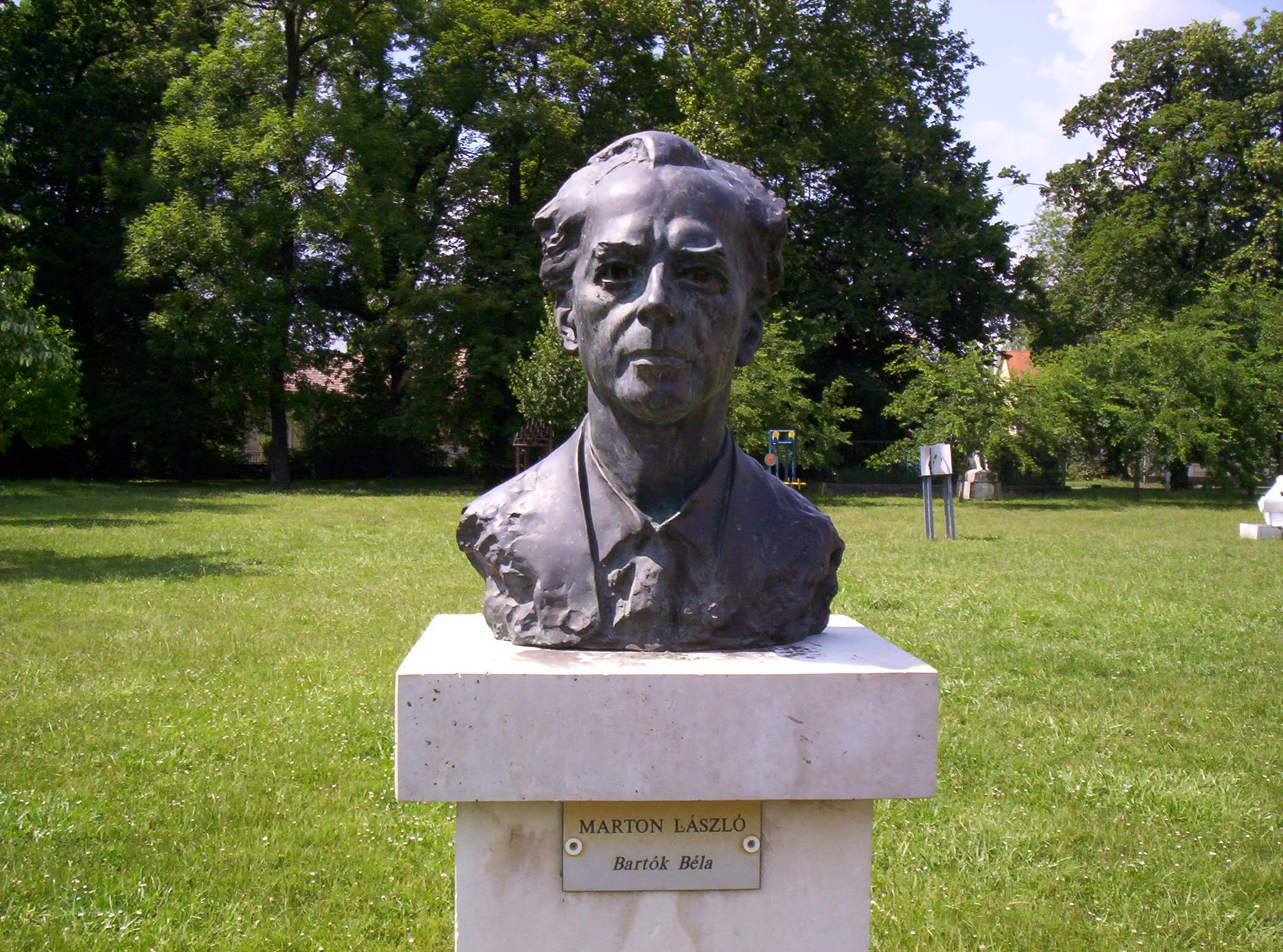 Béla Bartók, composer. László Marton's statue in Köztársaság Liget, Pápa, Hungary. Bartók Béla zeneszerző. Marton László szobra a pápai Köztársaság Ligetben.